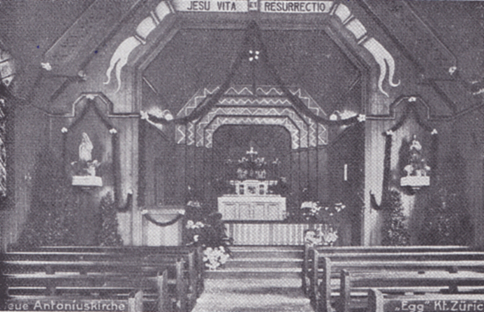 Römisch-katholische Pfarrkirche St. Antonius Egg, Innenansicht 1921